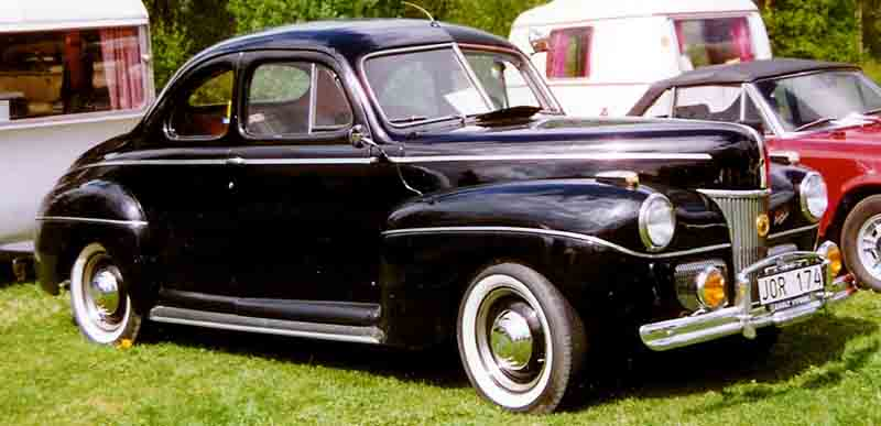 Ford Model 11A Super De Luxe Business Coupé 1941